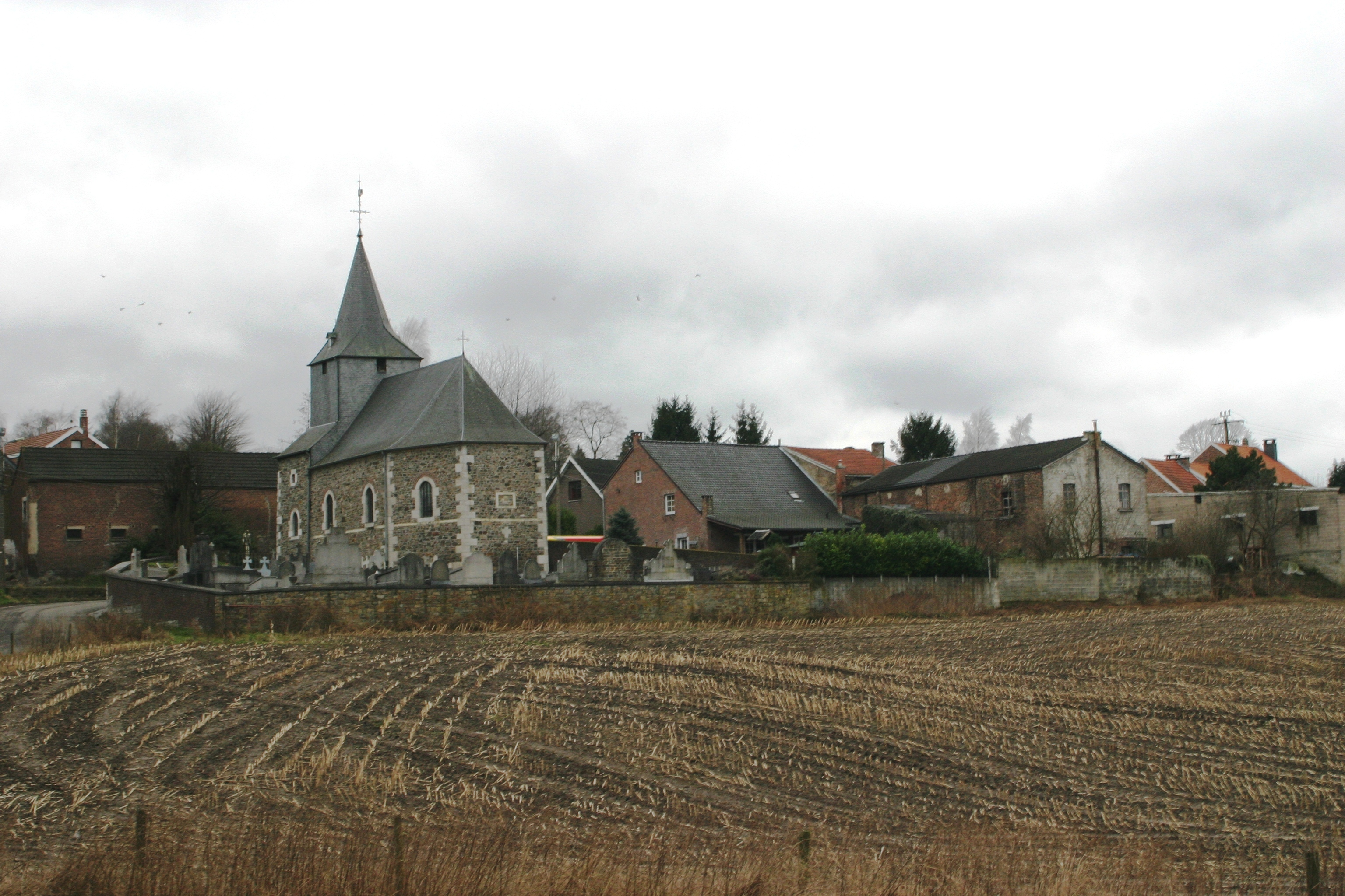 Évegnée Zentrum vun der Uertschaft mat der Kierch Notre-Dame.